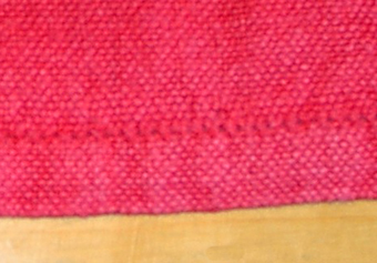 Fåll med hålsöm. (Knappt synligt ens i full storlek)